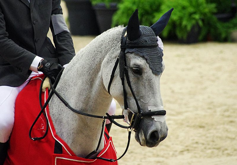 Silvana*HDC sous la selle de Kevin Staut, lors du Grand Prix Coupe du Monde d'Equita'Lyon.